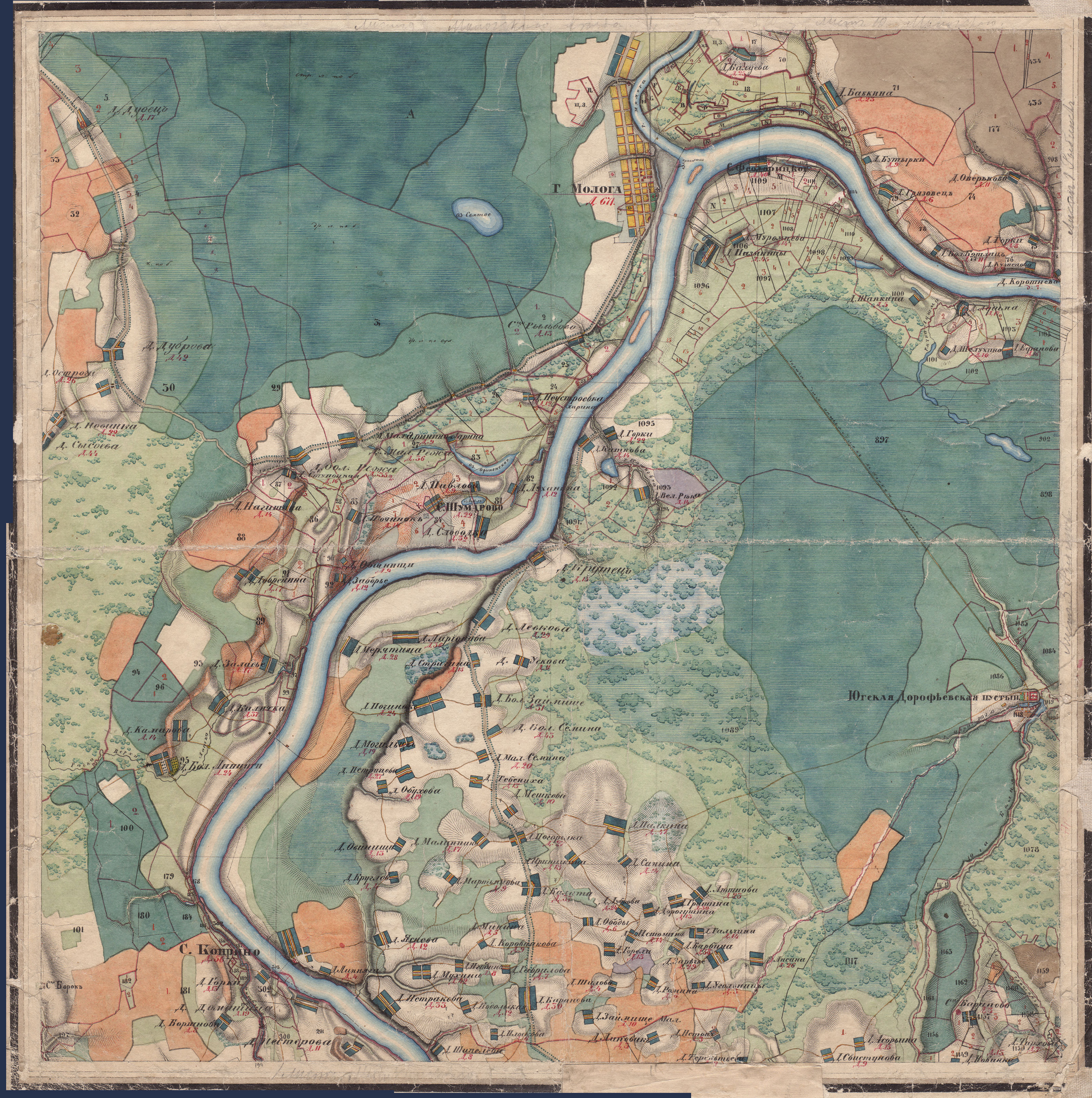 Молога и её окрестности